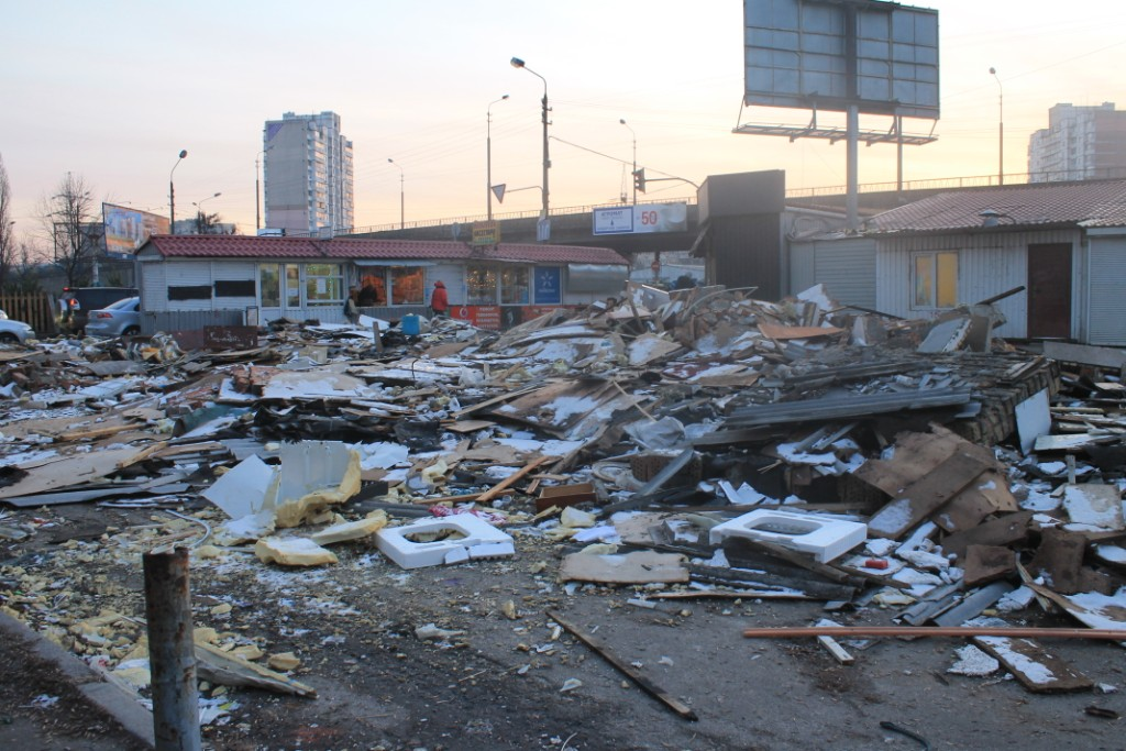 Залишки від знищених МАФи поблизу ринку Юність в Києві, вигляда станом на 31 грудня 2016